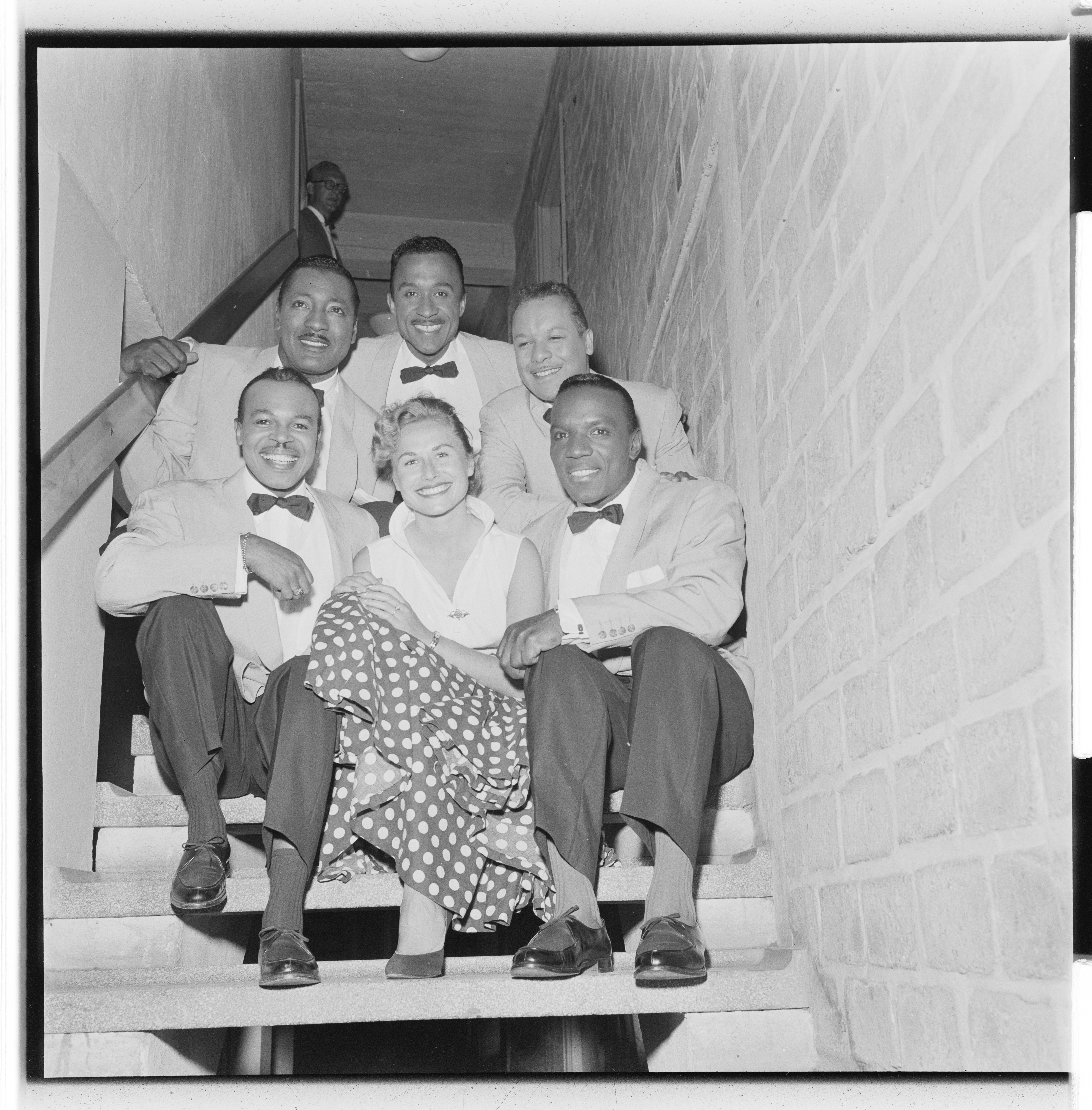 Bildet er hentet fra Arkivverket. Delta Rythm Boys på Jordal Amfi Arkivinstitusjon : Riksarkivet Arkivnavn : Billedbladet NÅ Sted : Norge, Oslo, Oslo, Jordal Amfi Emneord: konsert, musikere Avbildet: Delta Rythm Boys;Gulbrandsen, Synnøve